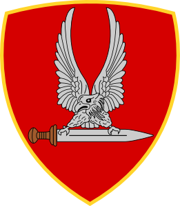 Scudetto del Comando Forze Speciali dell'Esercito.